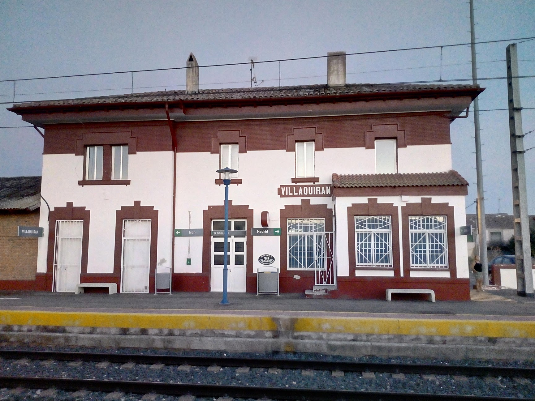 Estación de Villaquirán